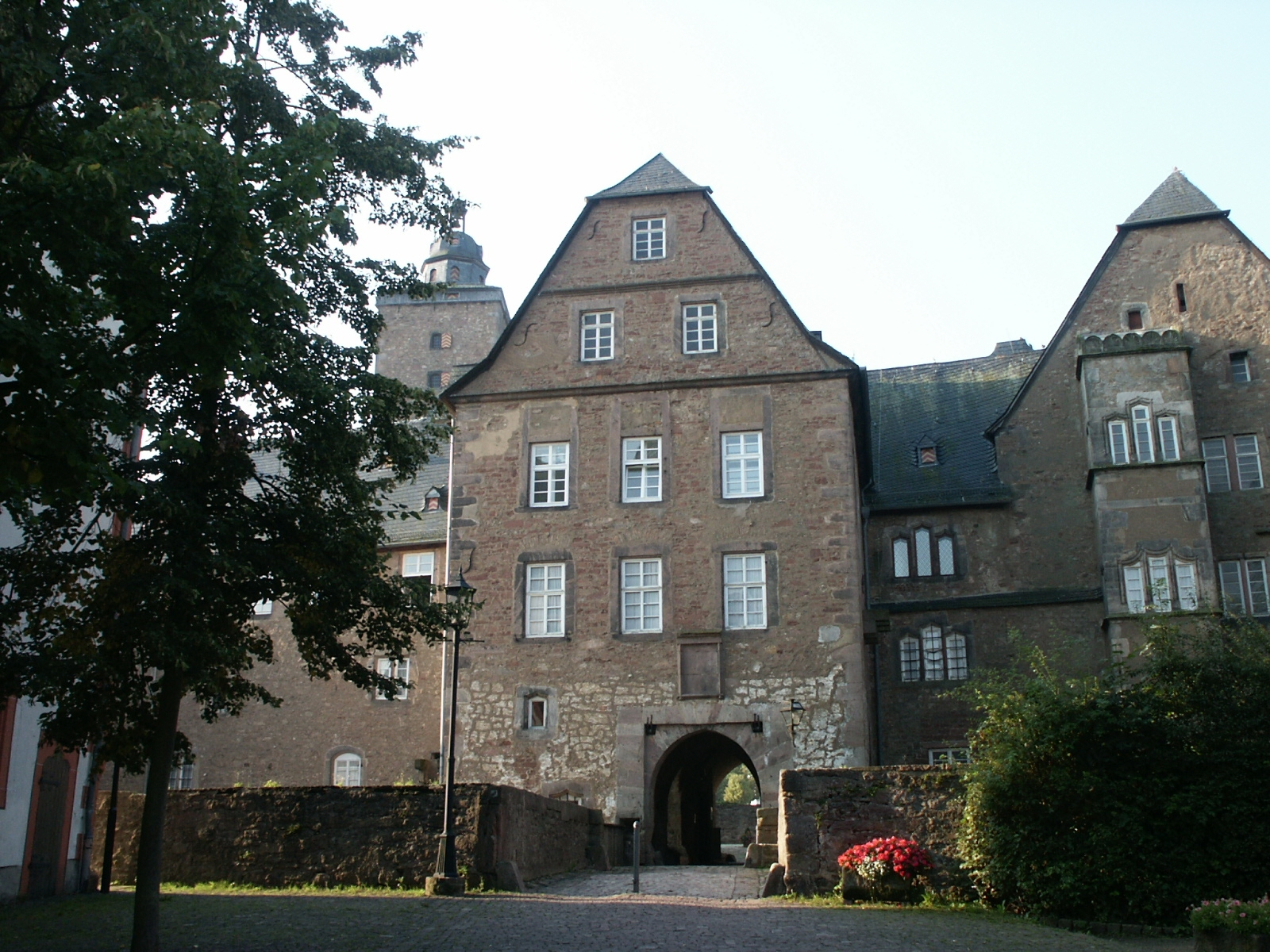 Außenansicht Schloss in Steinau vom Rathaus aus